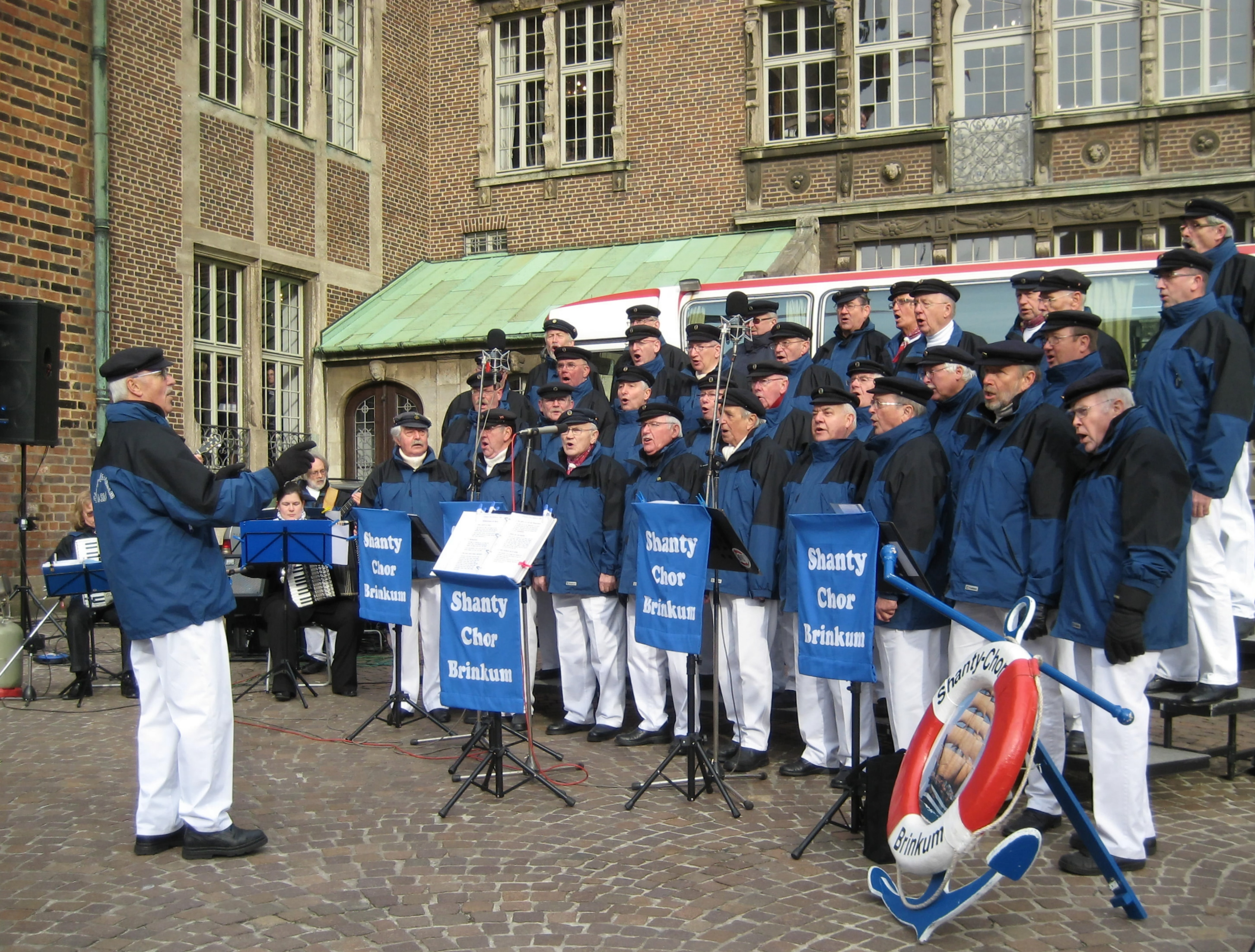 467. Schaffermahlzeit 2011 in Bremen: Der Shanty Chor Brinkum (aus Stuhr-Brinkum bei Bremen) begrüßt die eintreffenden Schaffer und deren Gäste mit einem Konzert auf dem Bremer Grasmarkt beim Ostportal des Alten Rathauses.